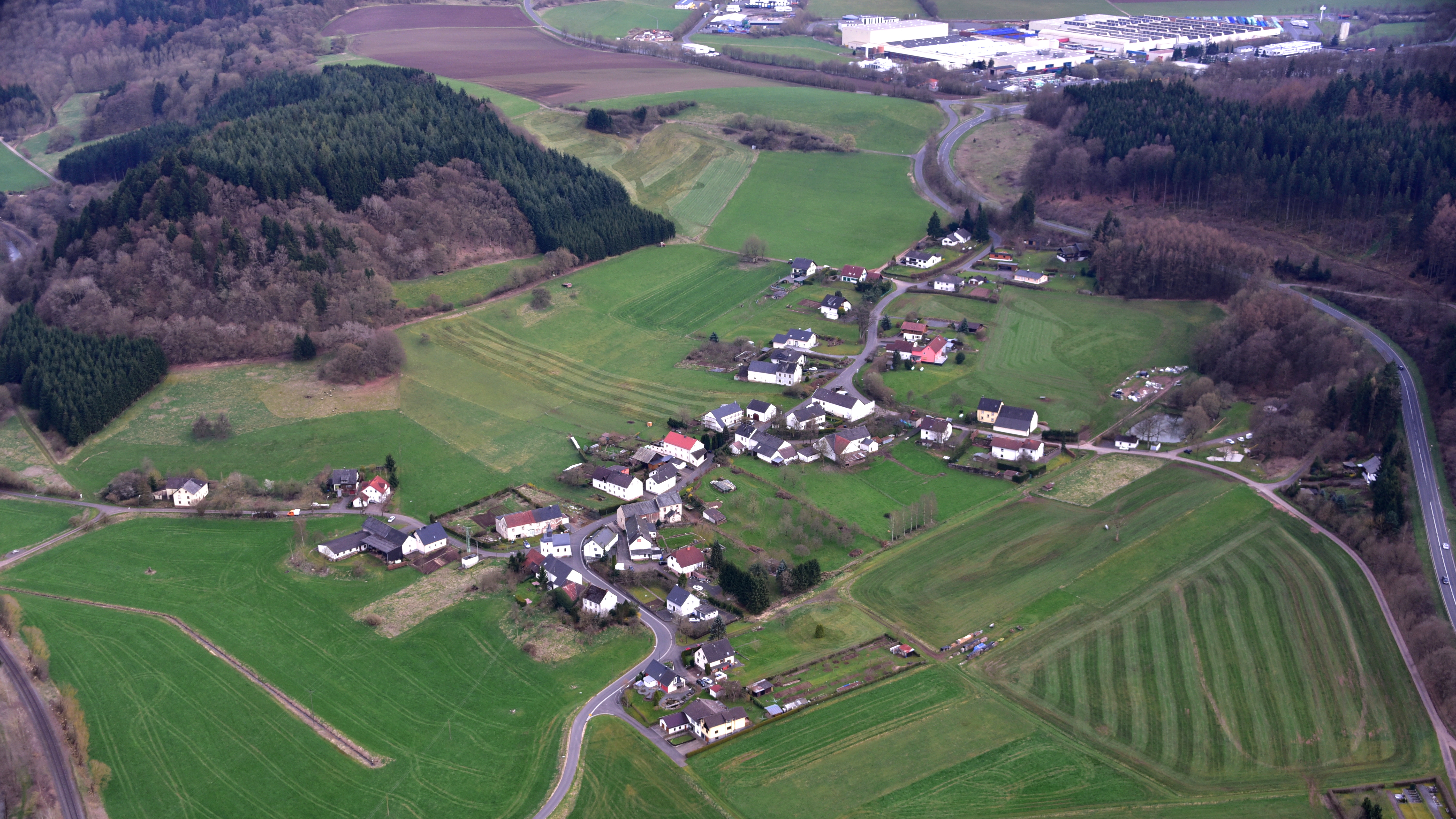 Bewingen, Luftbild (2016)